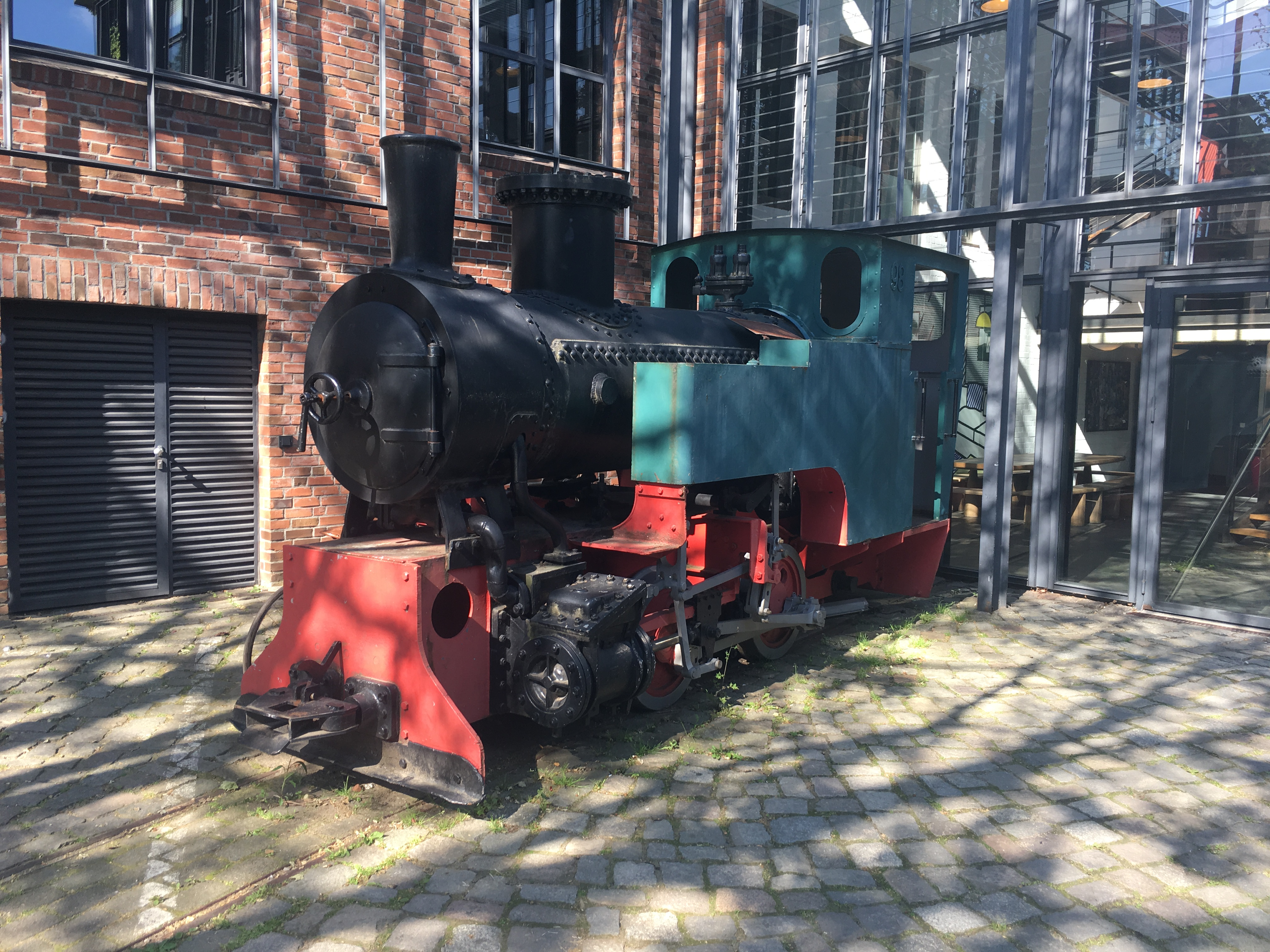 Hoesch Westfalenhütte "98" (10"), Jung 10606/1950 (2017)